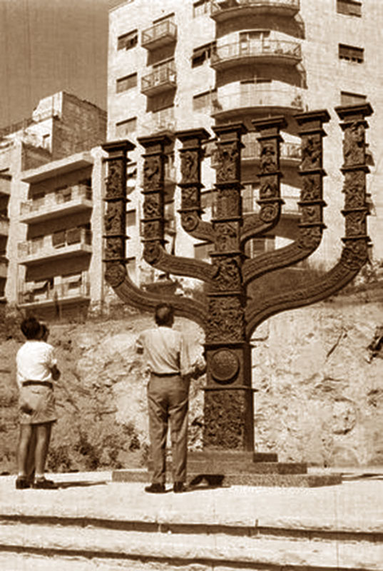 עיבוד לצילום של משה פרידן מ-1957